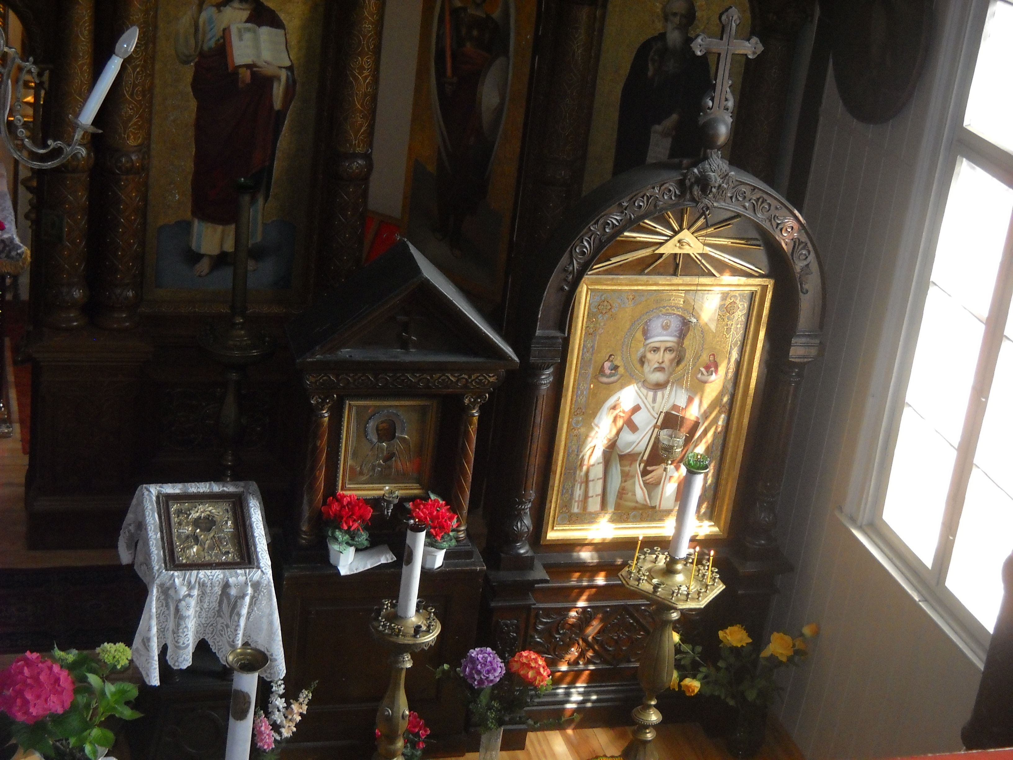 Ikony w cerkwi św. Mikołaja w Toruniu: św. Serafin z Sarowa i św. Mikołaj